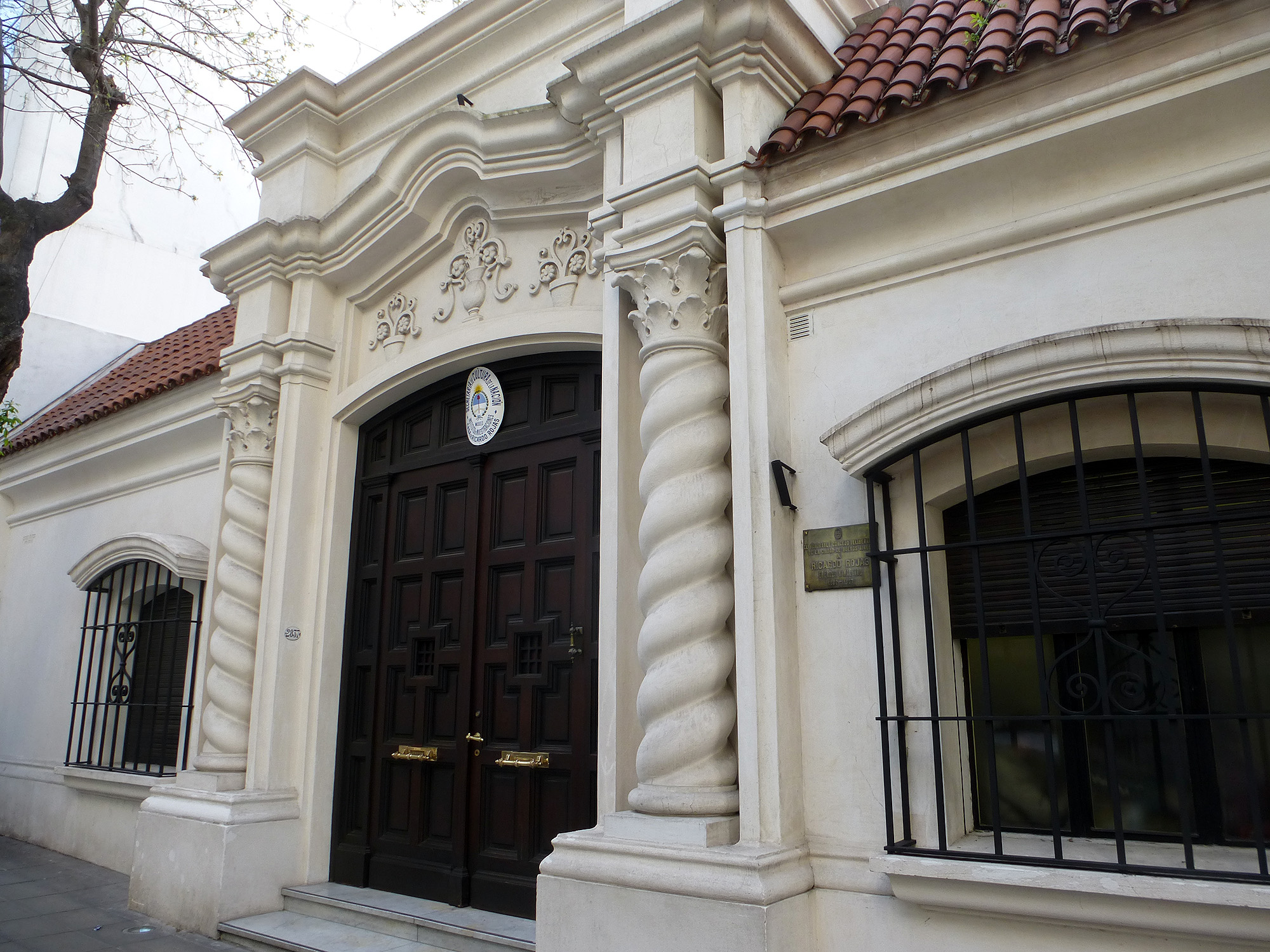 Casa de Ricardo Rojas